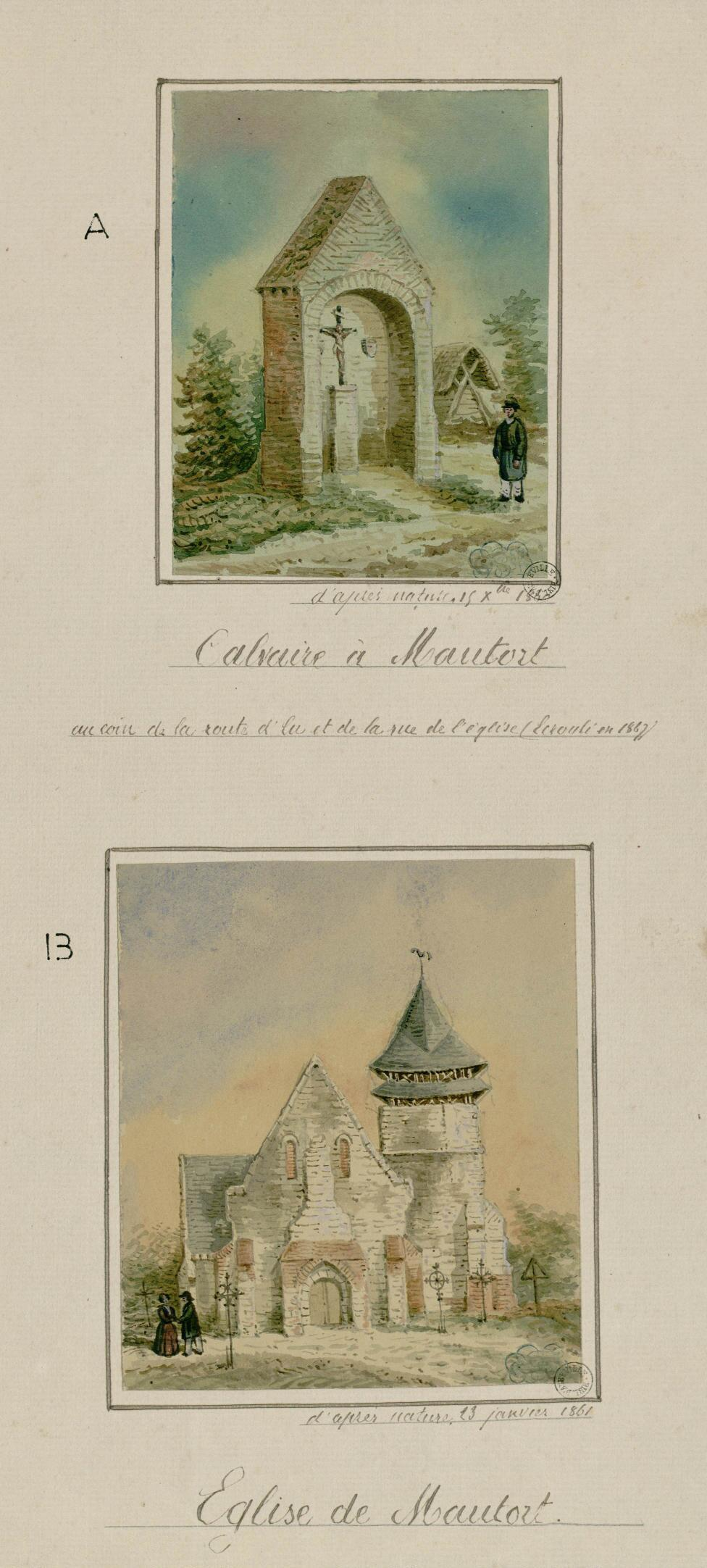 Légende : A. Calvaire à Mautort au coin de la route d'Eu et de la rue de l’église (exécuté en 1867) B. D'après nature. 13 janvier 1861